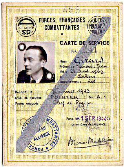 Photo perso de Tfouris extraite de son site